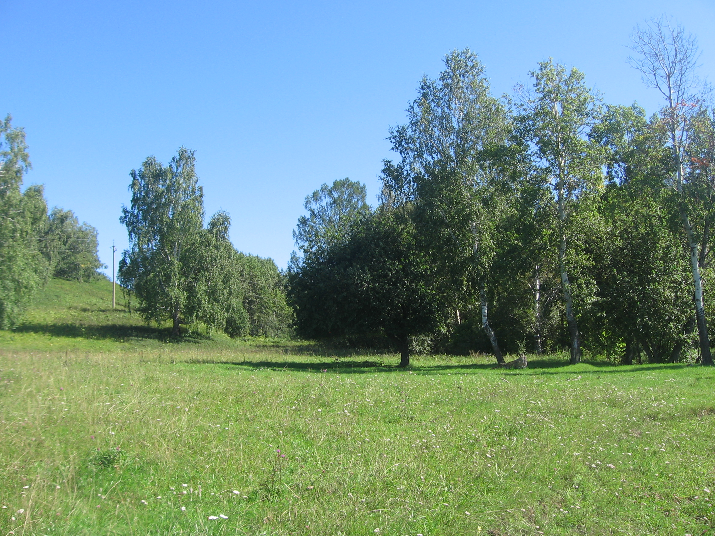 д.Казанка(Томский район)